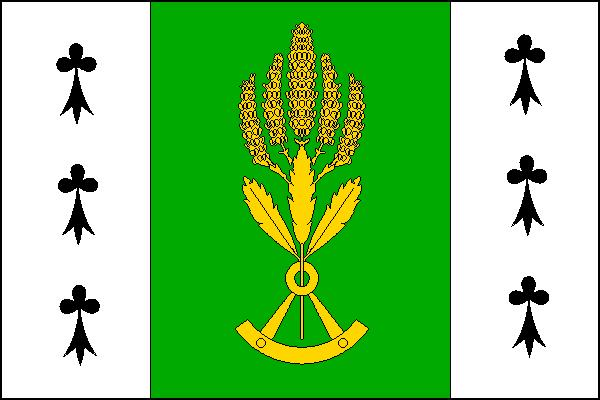 Vlajka obce Jeřišno